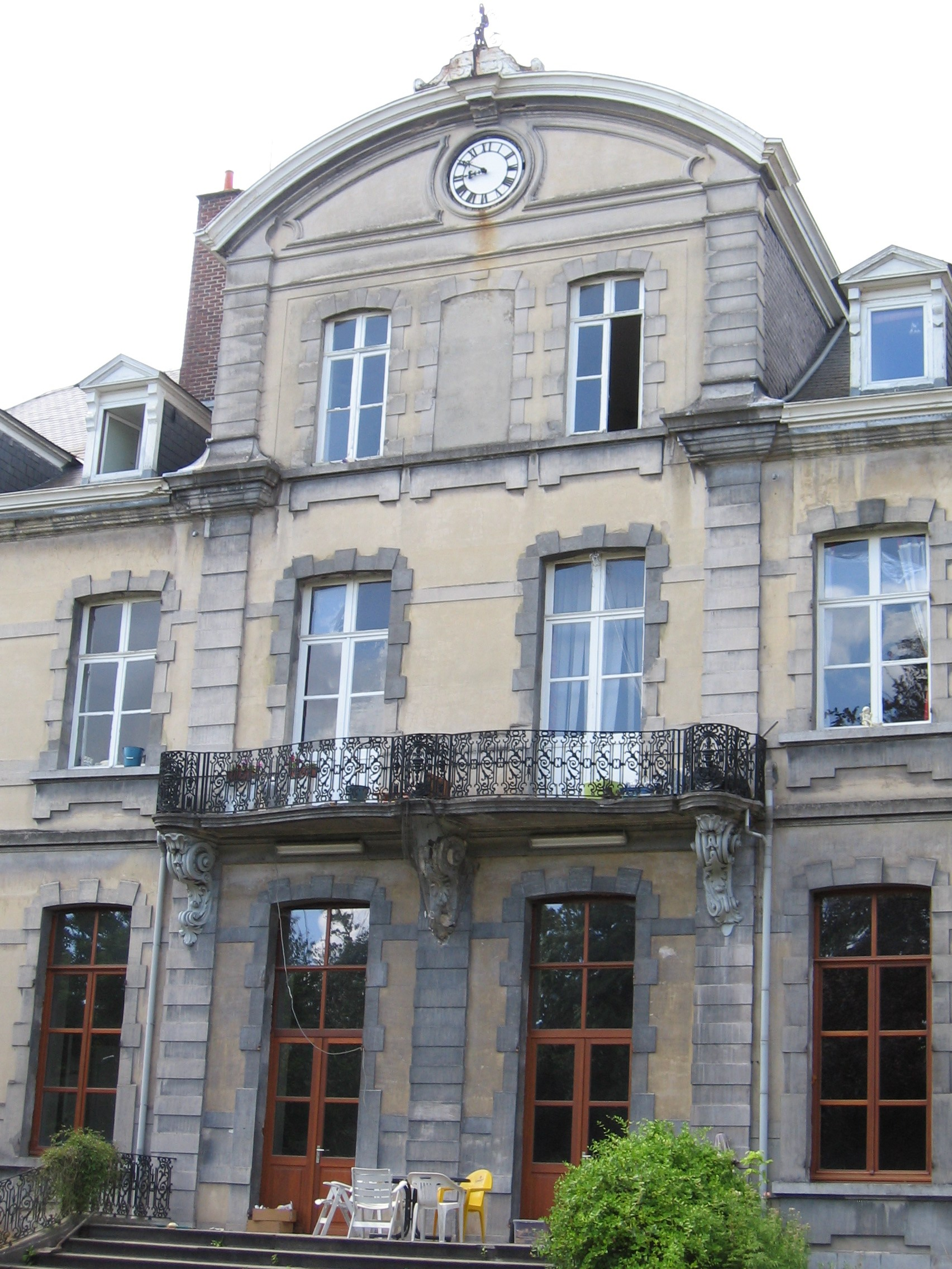 Ancien palais abbatial de l'abbaye du Saulchoir à Kain, près de Tournai (Belgique)